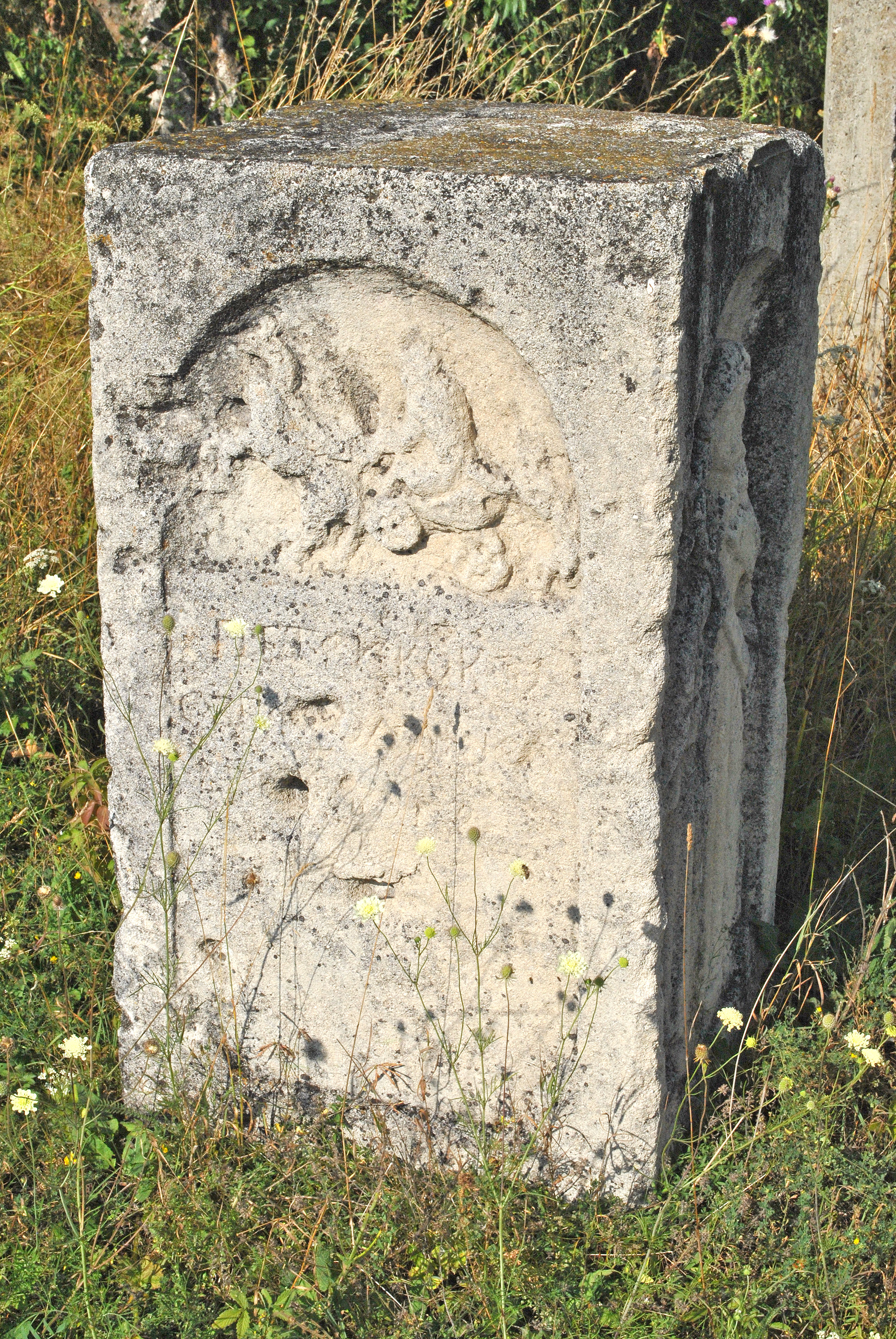 Пам'ятний знак на честь врятування дочки місцевого пана від вовків на межі сіл Петриків, Острів та смт Велика Березовиця Тернопільського району Тернопільської області.